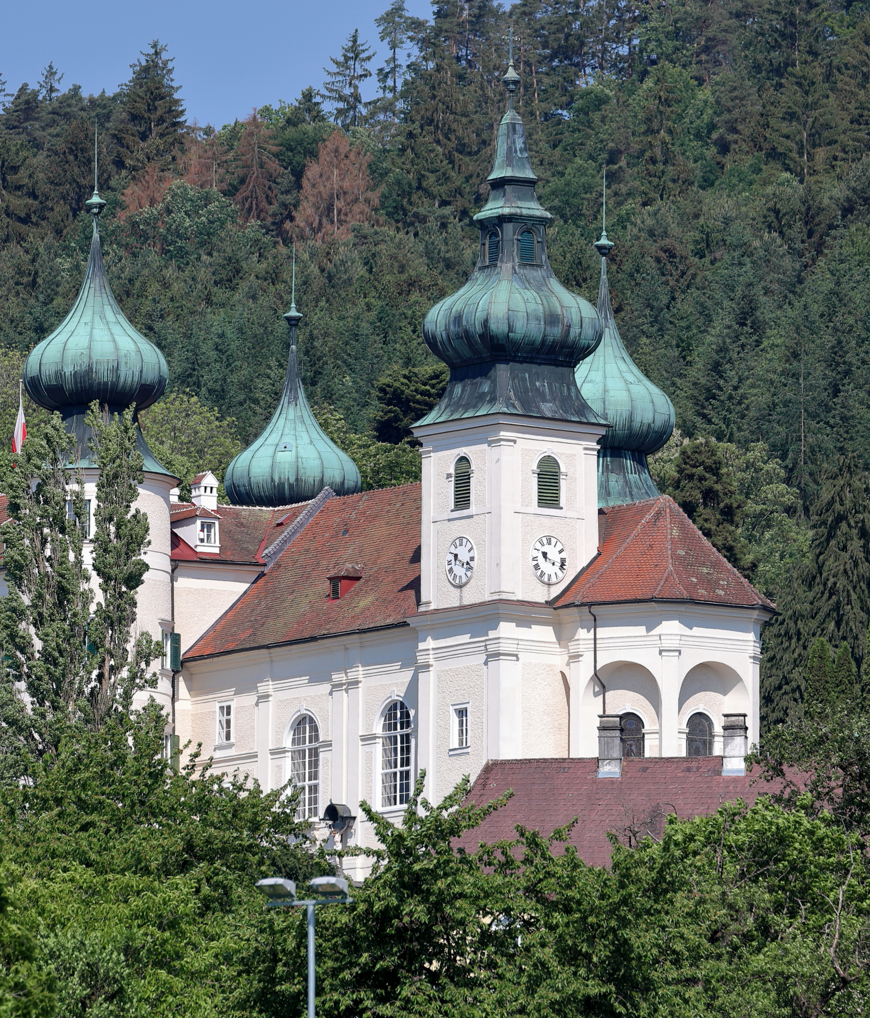 Südostansicht der röm.-kath. Pfarr- und Schlosskirche Artstetten in der niederösterreichischen Marktgemeinde Artstetten-Pöbring.Bei der Erweiterung und Umbau des Schlosses Ende des 17. Jahrhunderts wurde auch die Schlosskapelle vergrößert und Richtung Westen verlängert, so dass die ursprünglich freistehende Schlosskapelle seitdem mit dem Schlossgebäude eine Einheit bildet. Das historistisch erweiterte und mehrfach umgebaute Renaissanceschloss wurde in der 2. Hälfte des 16. Jahrhunderts wahrscheinlich auf den Grundfesten einer mittelalterlichen Burg errichtet.